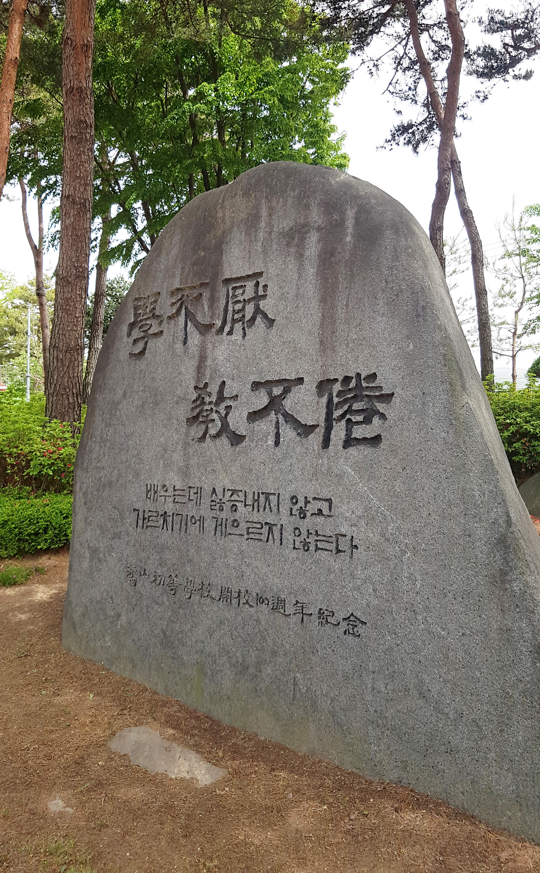 홍산초등학교 100주년비